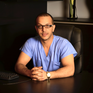 الدكتور خالد الزهراني استشاري الجراحة التجميلية